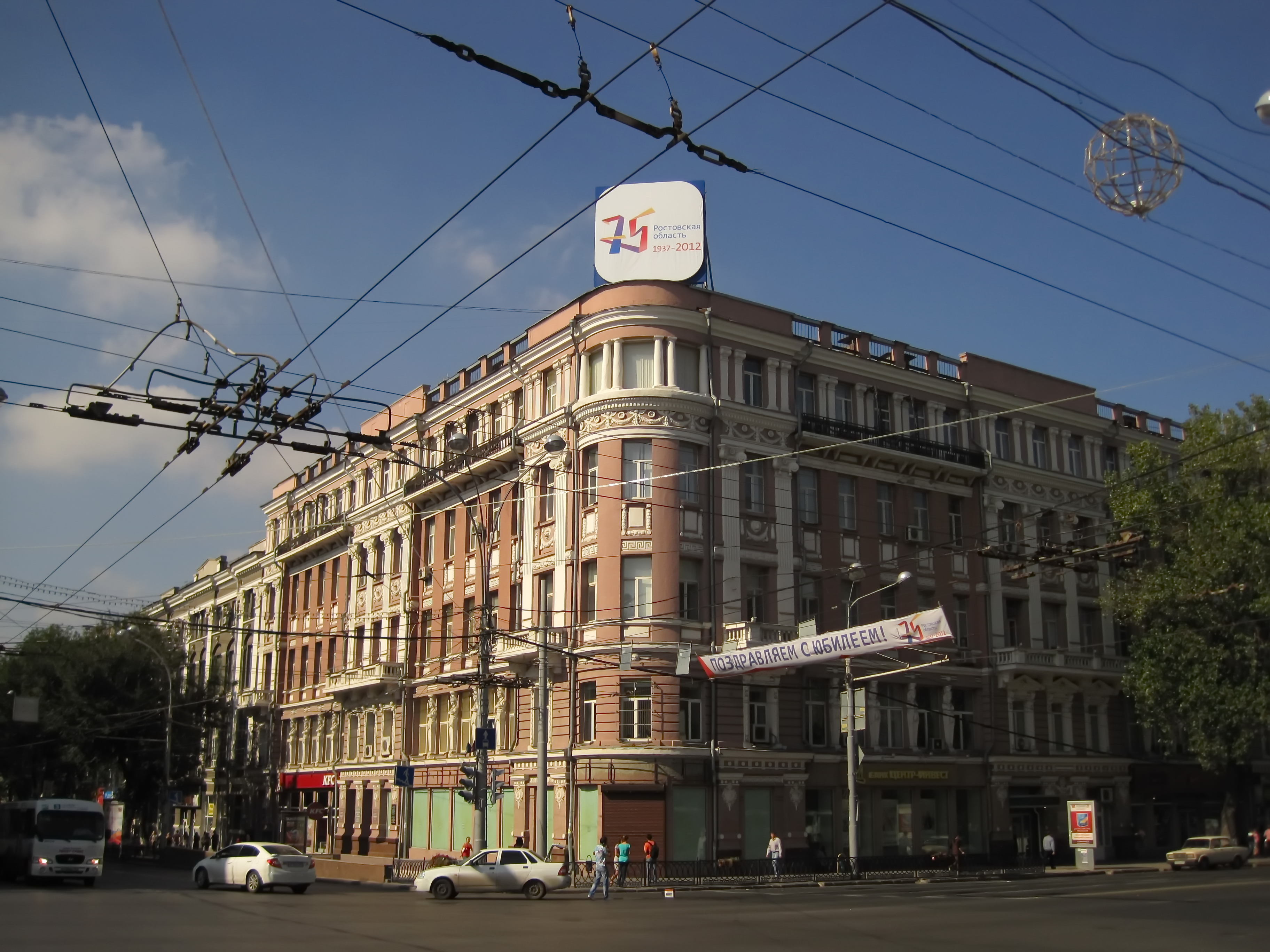 здание доходного дома Черного, угол Ворошиловского и Садовой